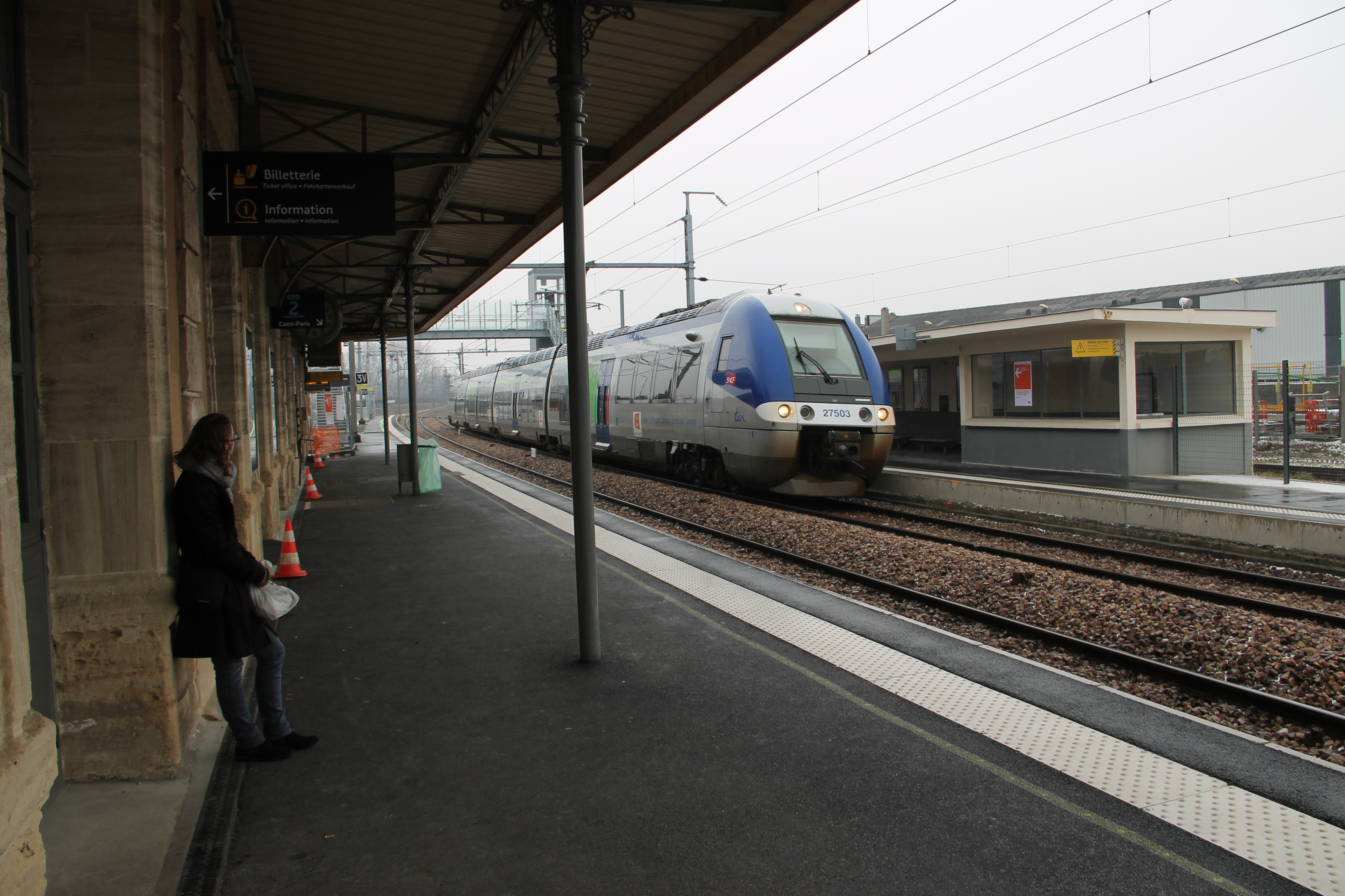 TER pour Saint-Lô en mars 2018